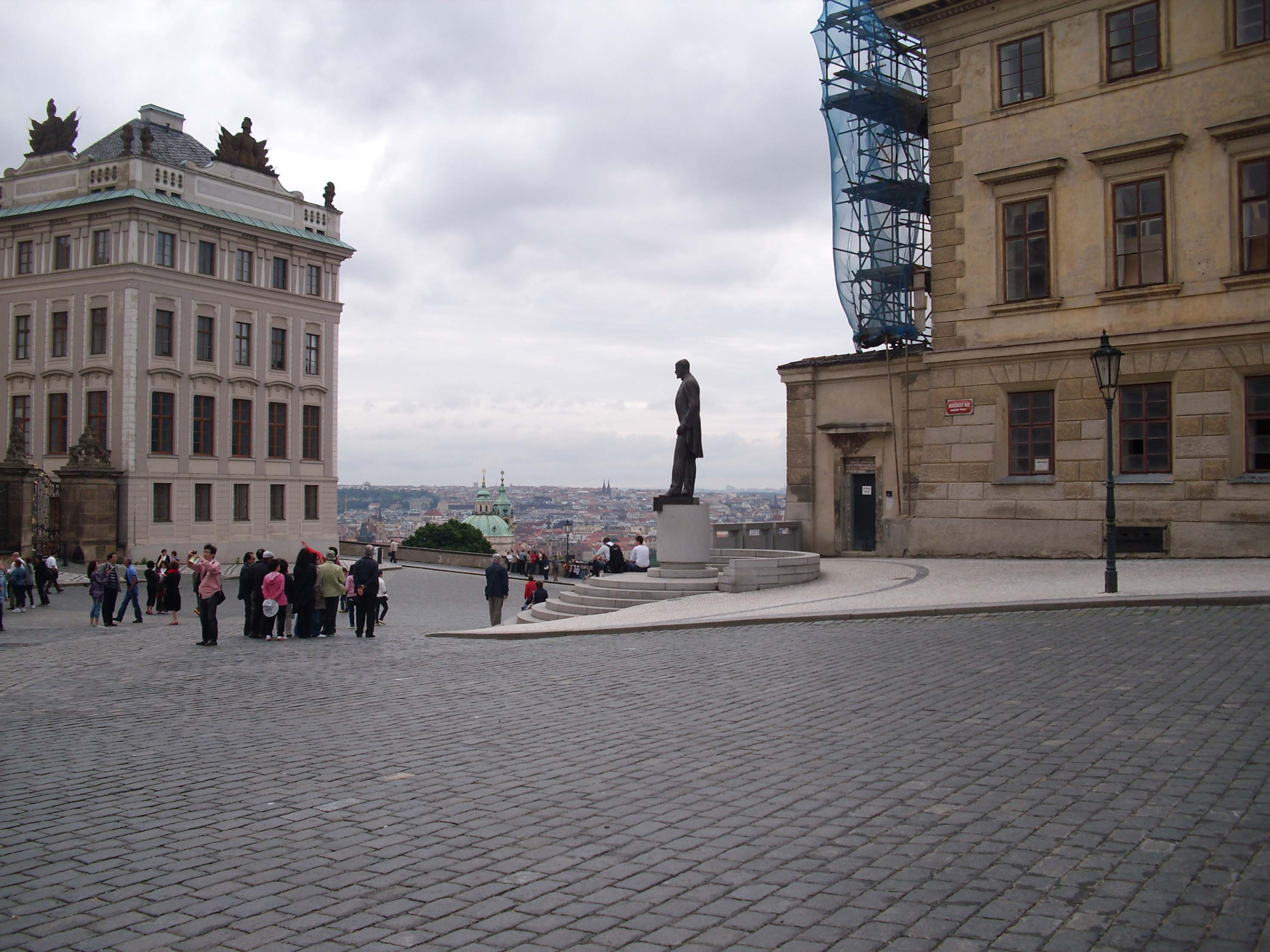 Tomáš Masaryk - Praha - Česko